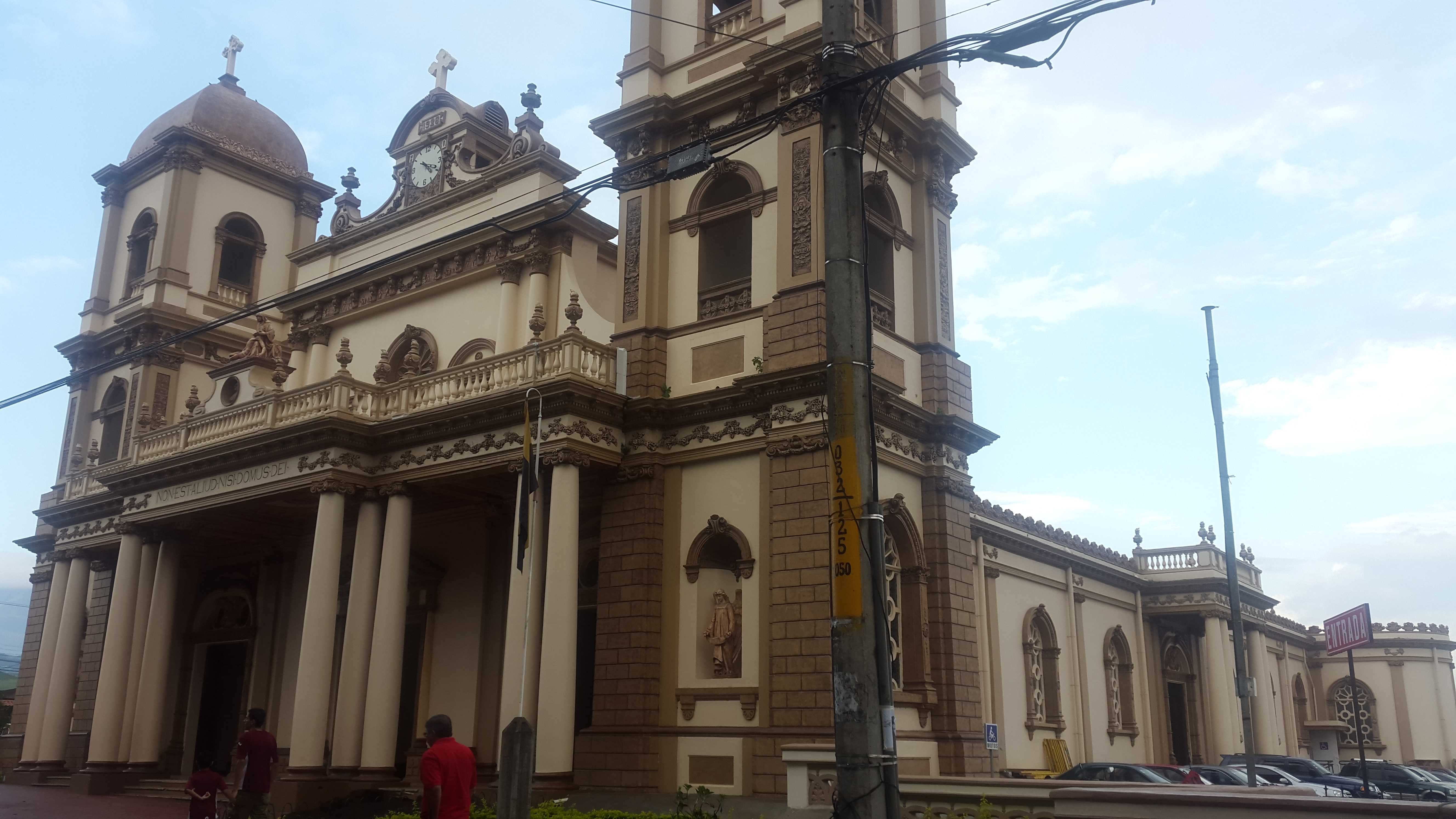 Basílica de Nuestra Señora de la Piedad, en Naranjo, Costa Rica.